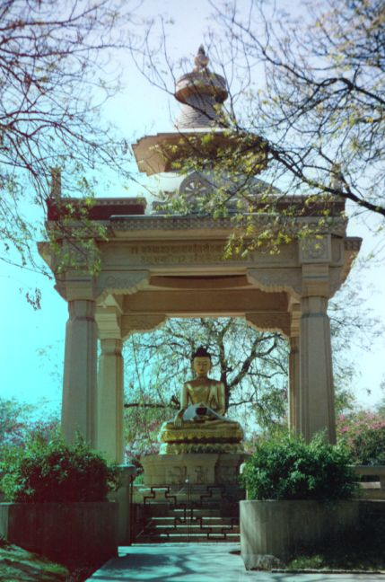 The Buddha statue in Buddha Jayanti Park.